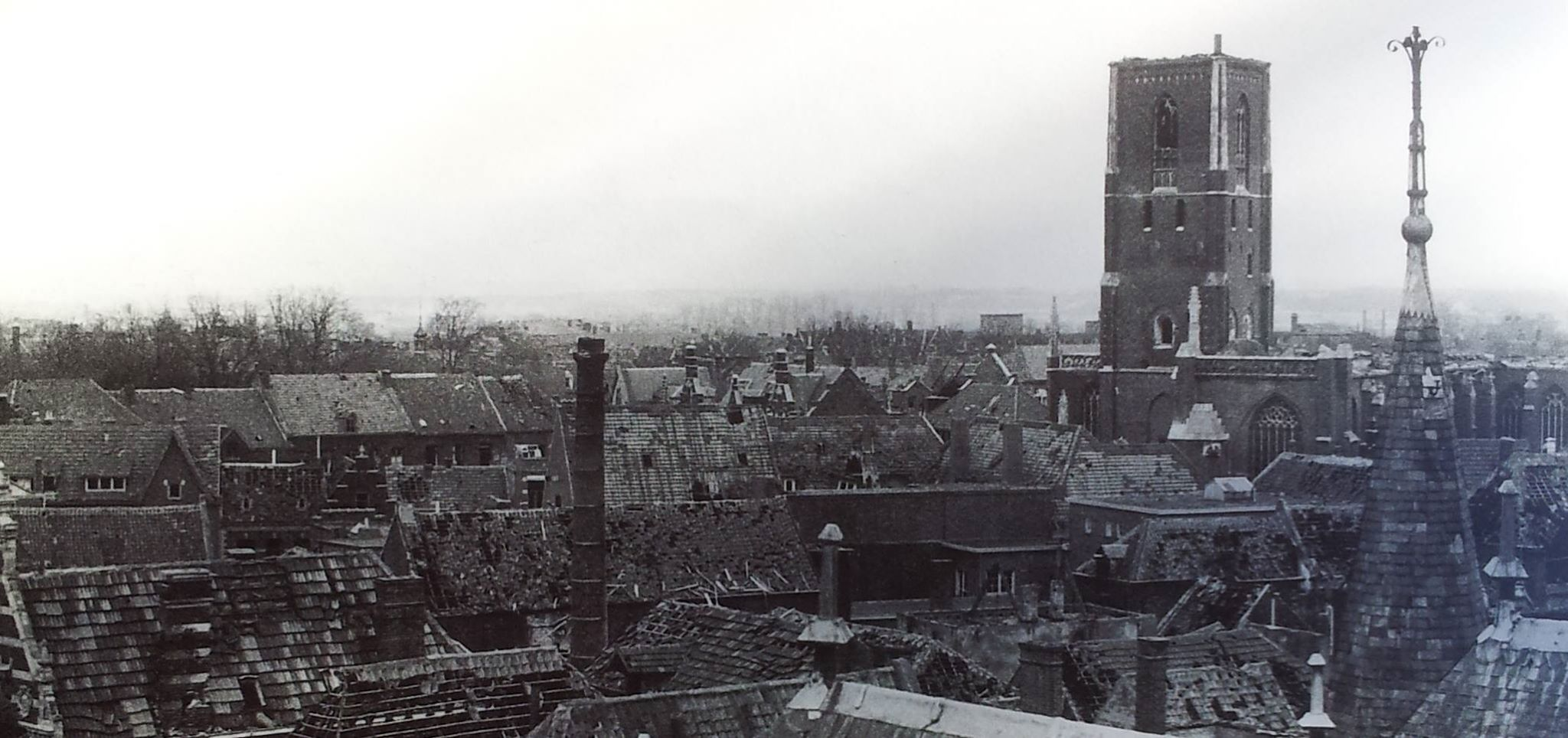 De Venlose binnenstad na de bombardementen, met rechts de zwaar beschadigde toren van de Sint-Martinuskerk